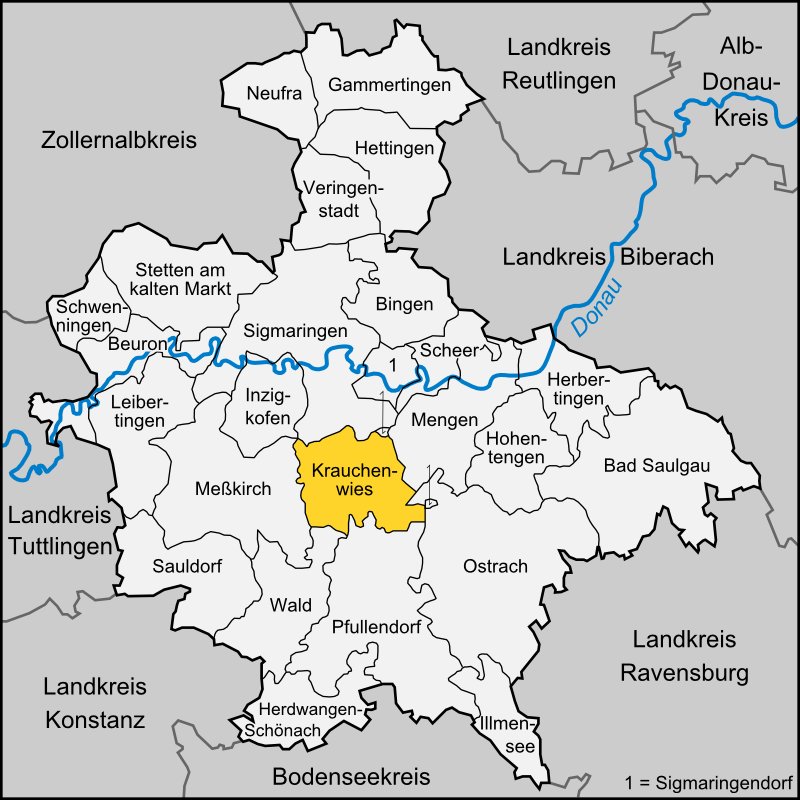 Karte der Gemeinde Krauchenwies im Landkreis Sigmaringen